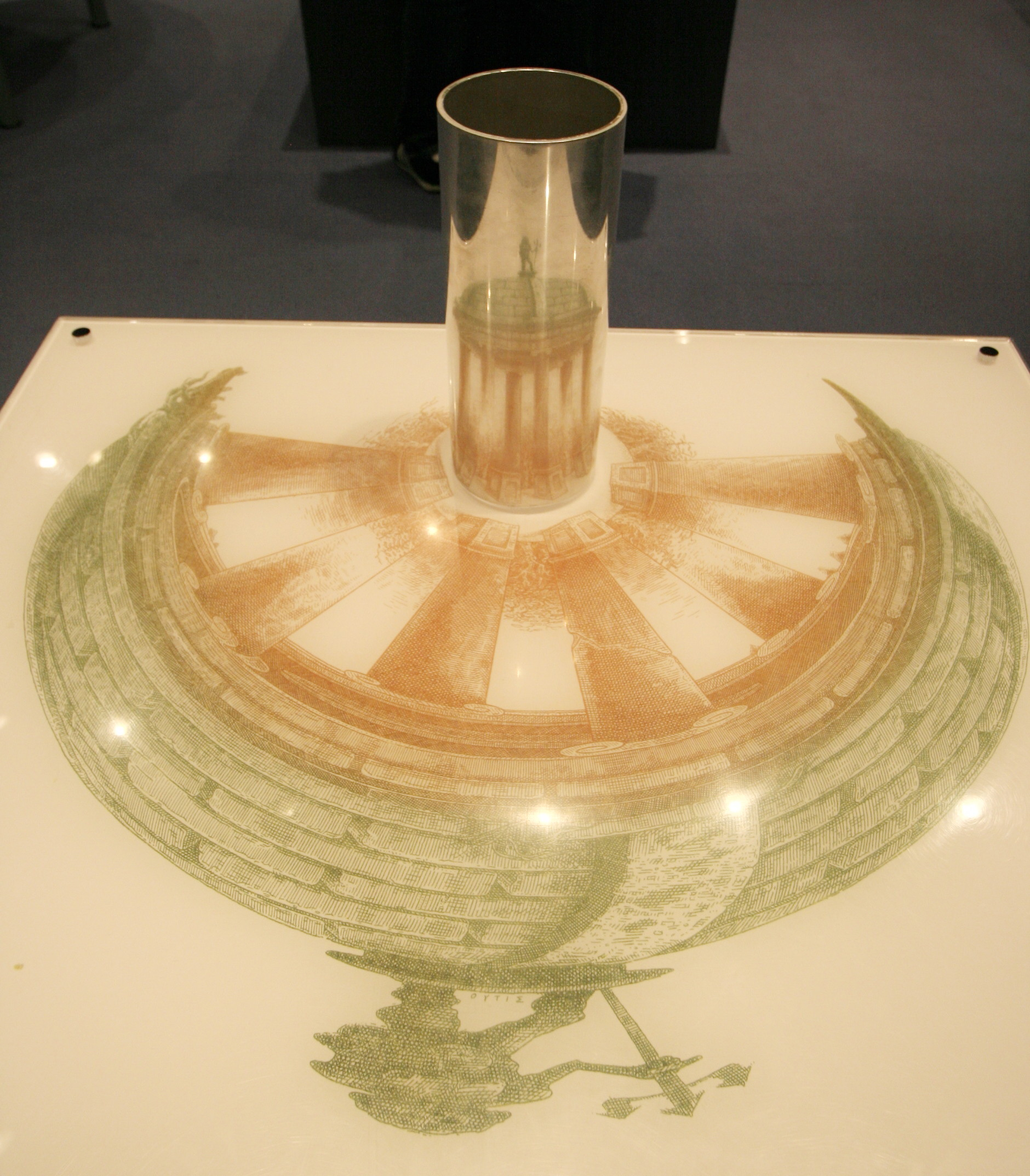 An artwork by István Orosz